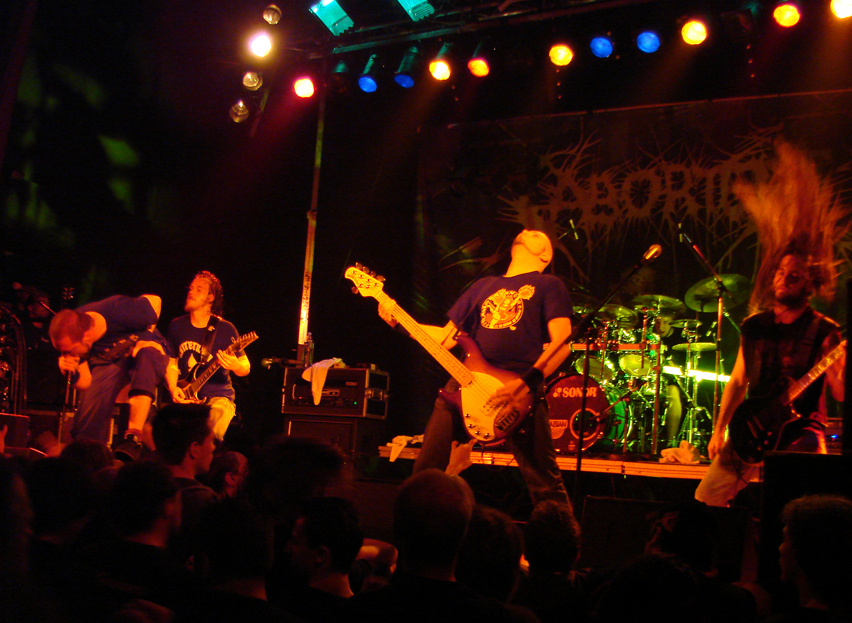 Aborted au Coolness'tival 2007, le 3/11/07 à Montdidier (60).